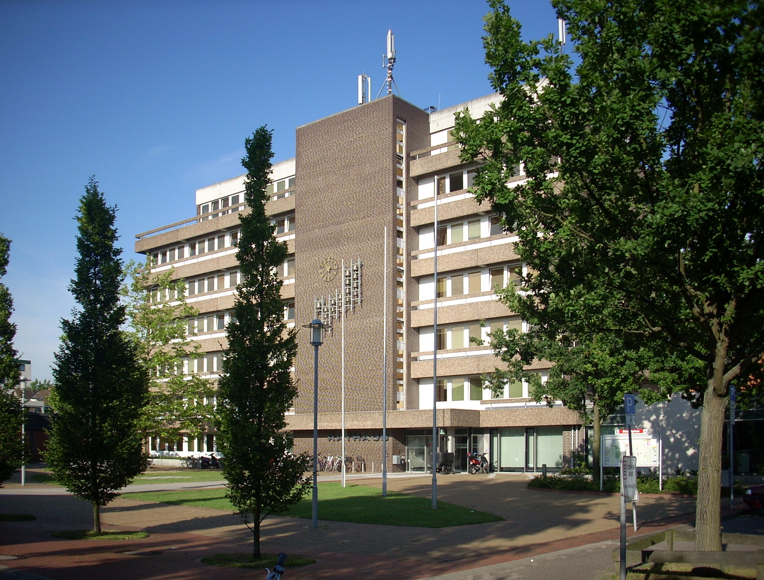 Rathaus Sehnde, Germany